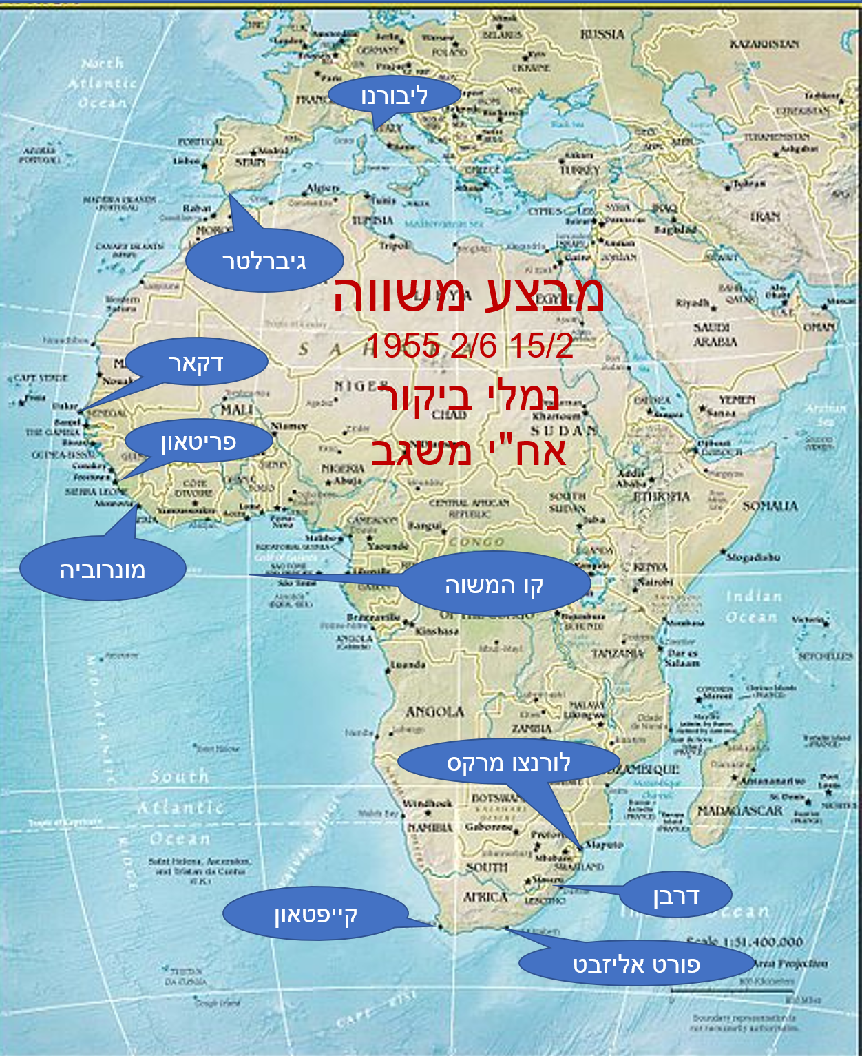 נמלי ביקור אח"י משגב (ק-30) במבצע משווה 1955על גבי מפה חופשית מהויקיפדיה